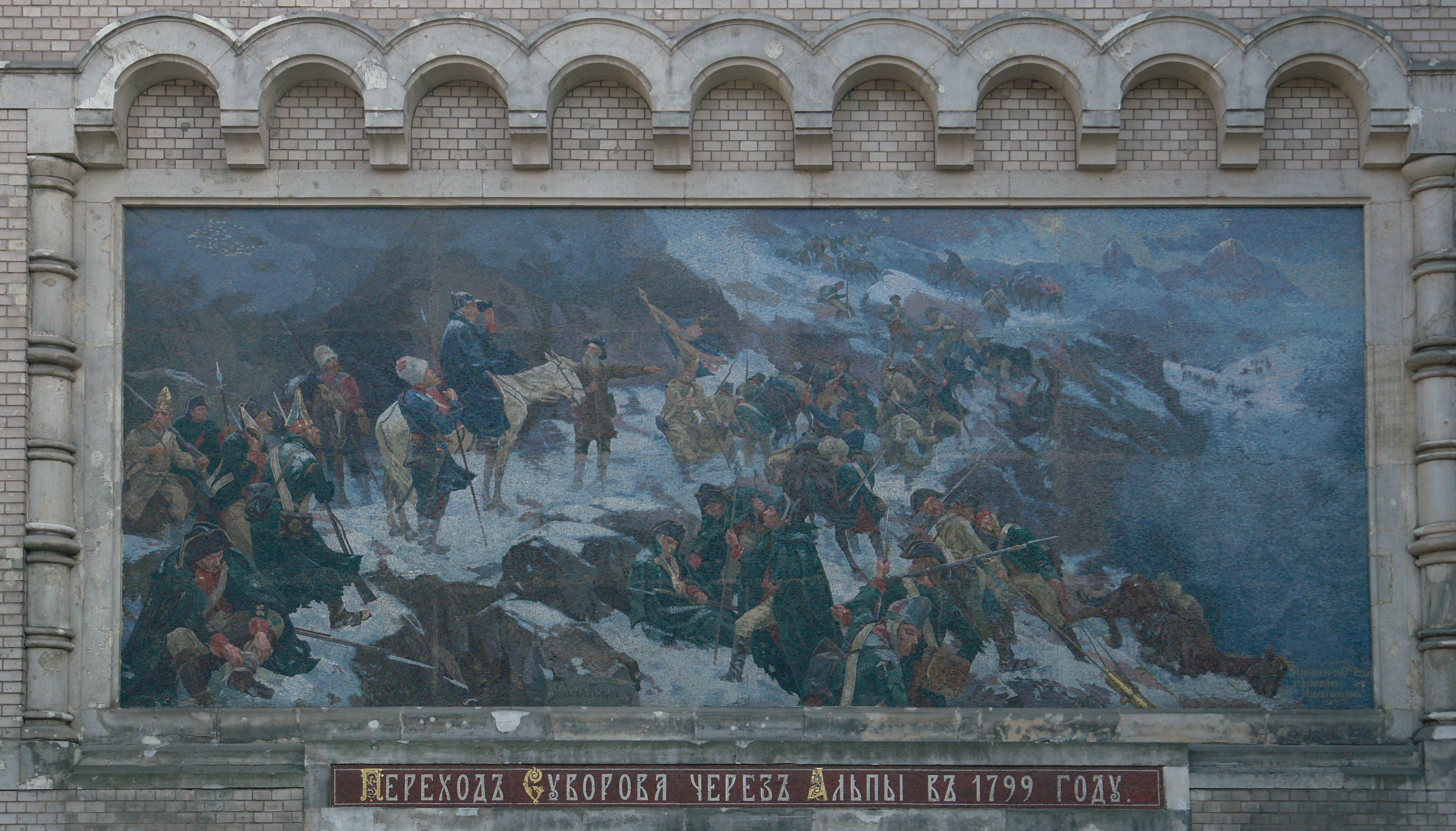 Фасад Государственного мемориального музея А.В. Суворова, мозаика «Переход Суворова через Альпы в 1799 г.», мозаичист Н.Е. Масленников; по эскизам художника А. Н. Попова "Переход Суворова через Альпы". 1904-1904 гг. Кирочная улица 43, Санкт-Петербург, Россия)